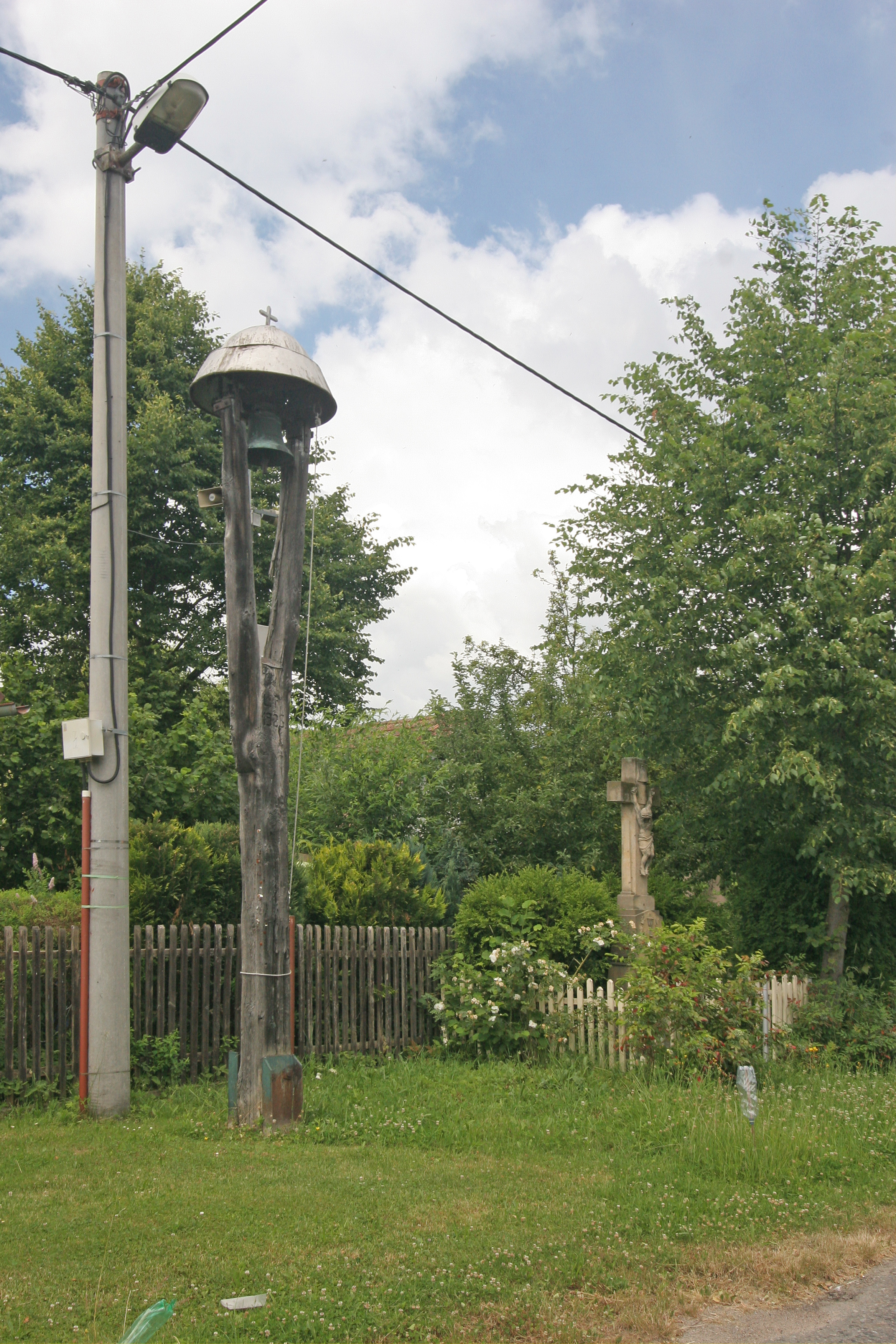 Drahoš zvonička